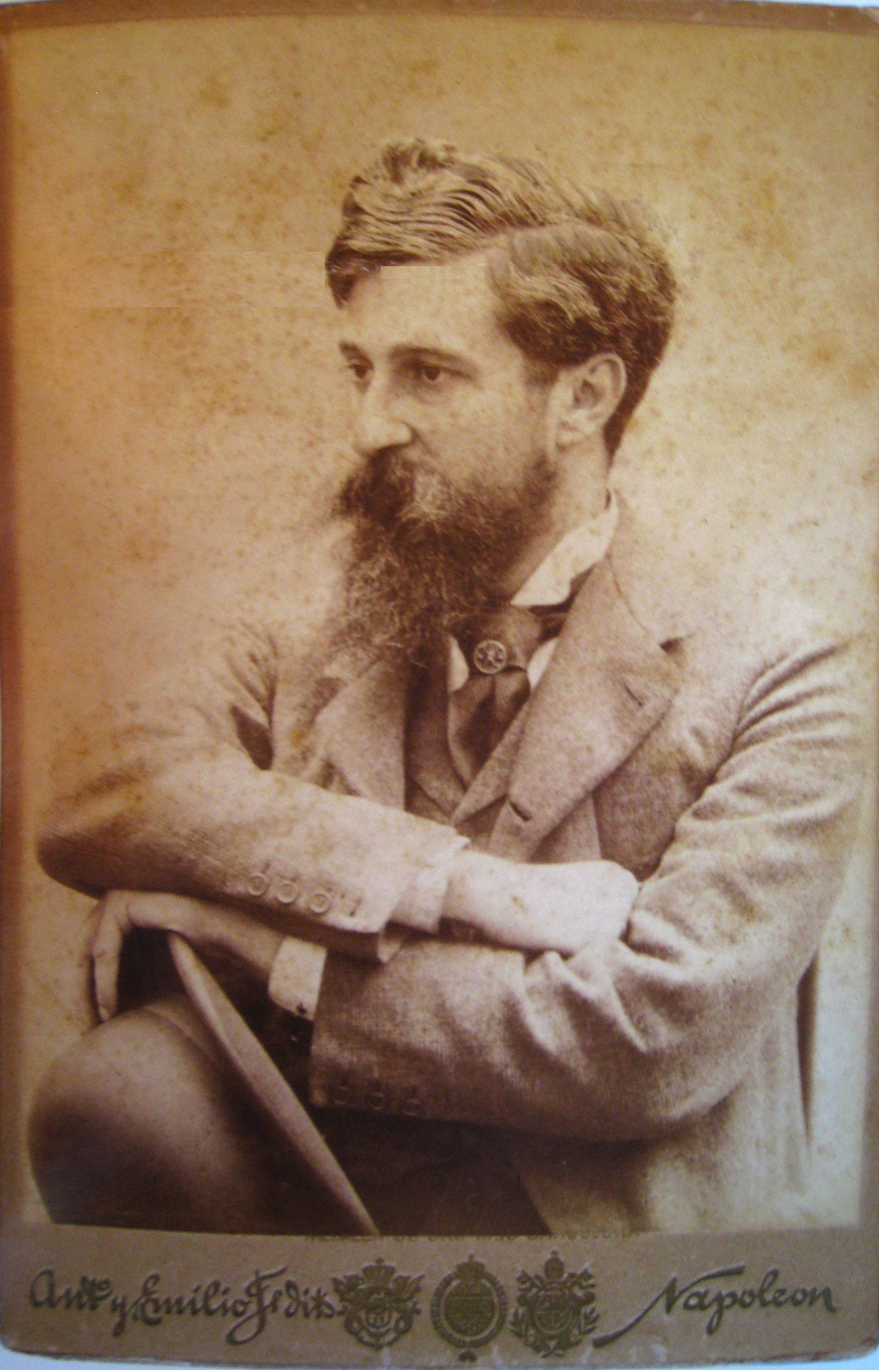 Retrat de l'artista Santiago Rusiñol (Barcelona, 25 de febrer de 1861 - Aranjuez, 13 de juny de 1931). Obra dels Fotògrafs Napoleon de 1892.